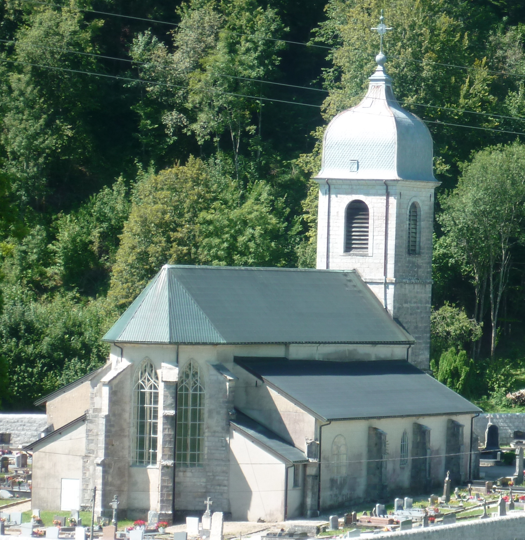 Église Ste Marguerite de Chaux des Crotenay, Jura, France (recadrage de Église Ste Marguerite de Chaux des Crotenay, Jura, France.JPG